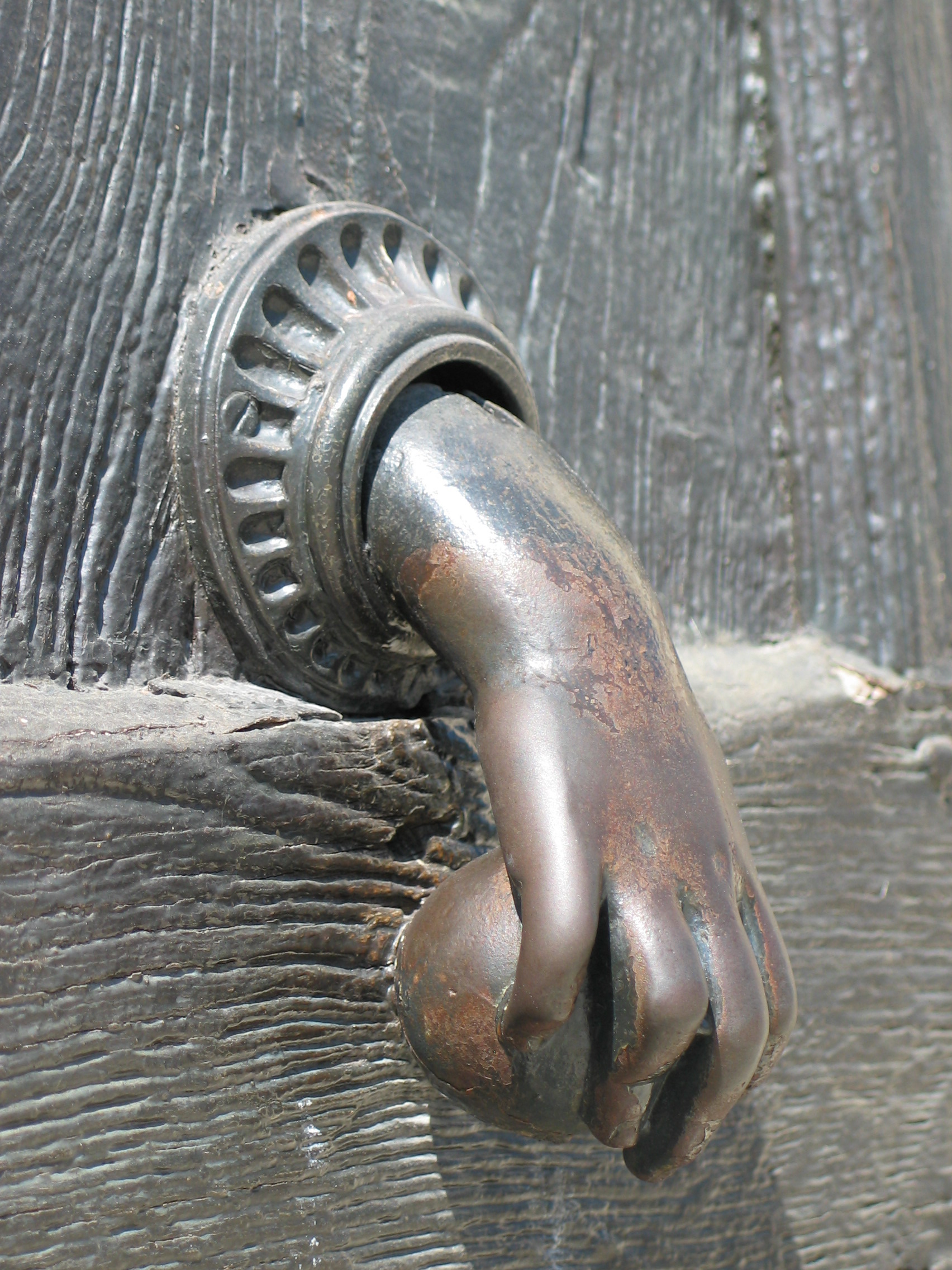 Un heurtoir à Orléans (France)